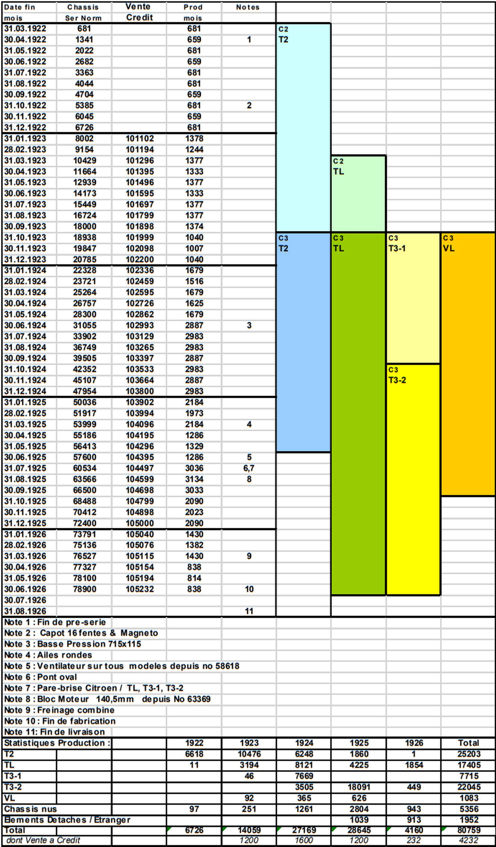 Tableau de datation des vehicules Citroen type C par No de chassis et par modele ainsi que statistques de production par annee et par modele